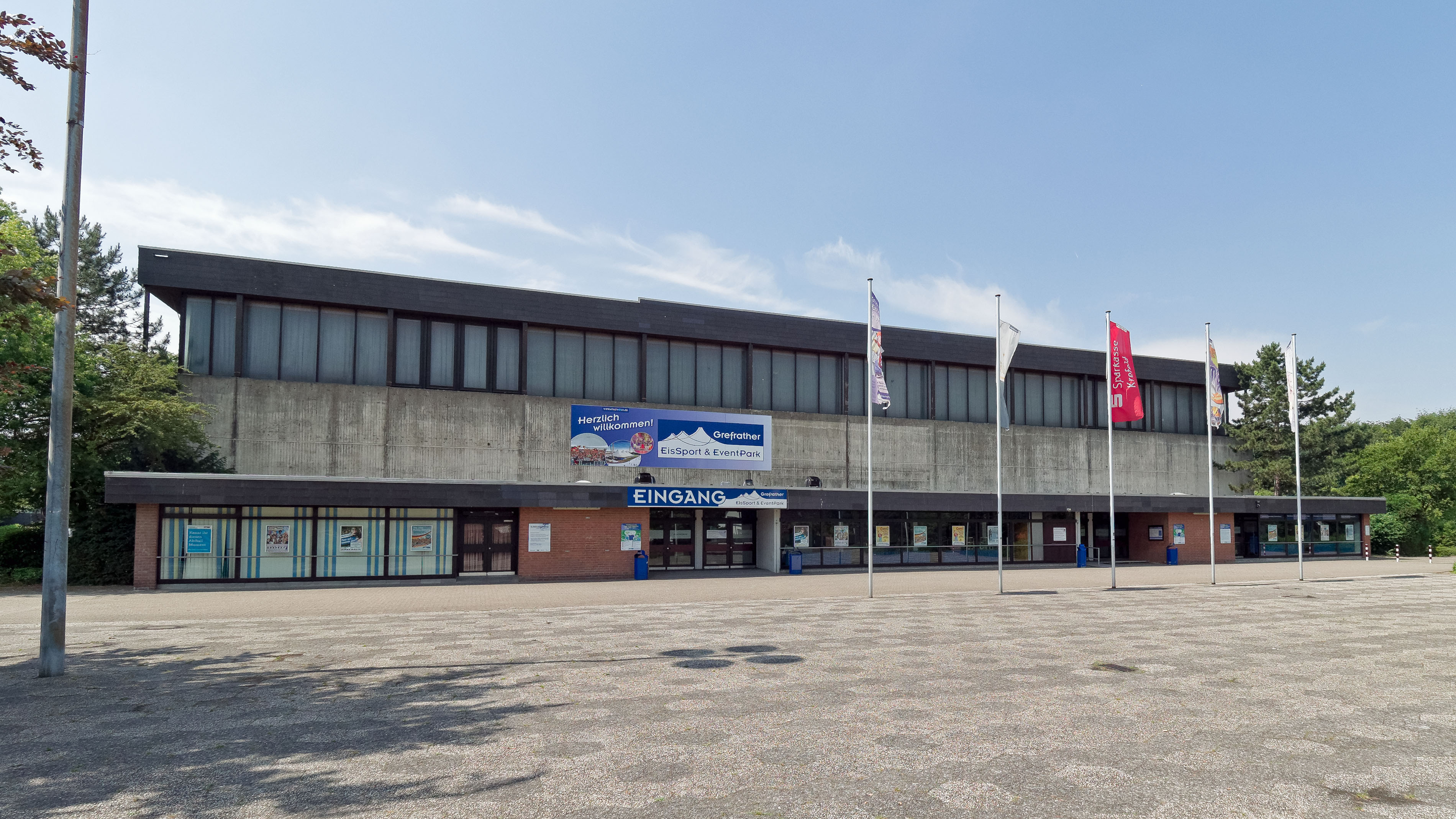 Grefrather EisSport & EventPark, Stadionstraße 161, 47929 Grefrath